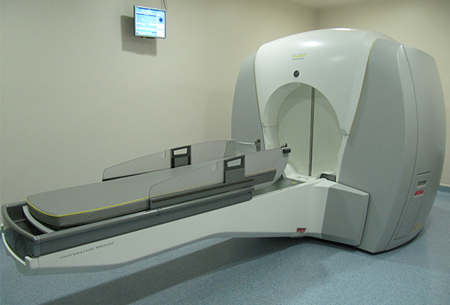 Гамма-нож в госпитале CUF